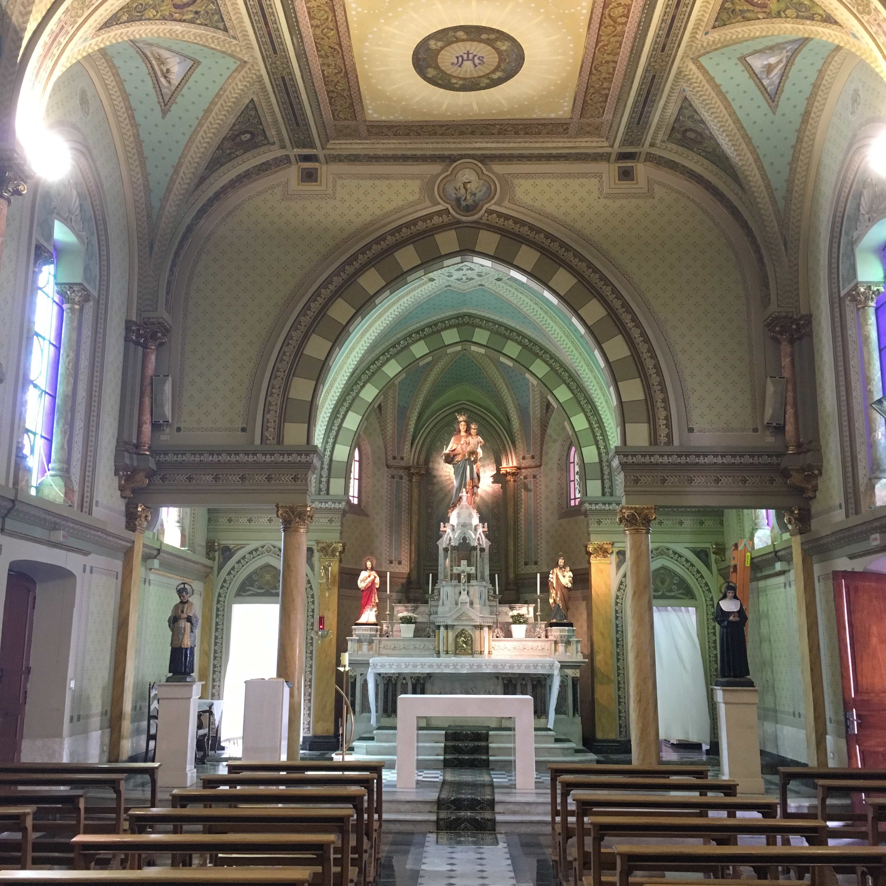 Visão geral da capela do colégio.